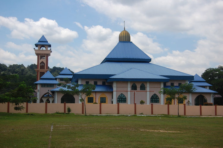 Masjid Al-Ehsaniah Kampung Melayu Batu 16, Rawang